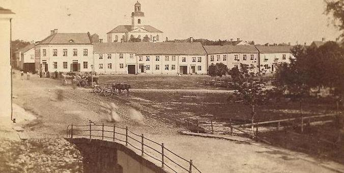 Fotografi från Åmål av Gustaf Fredrik Diehl (1847-1904) från 1870-72.